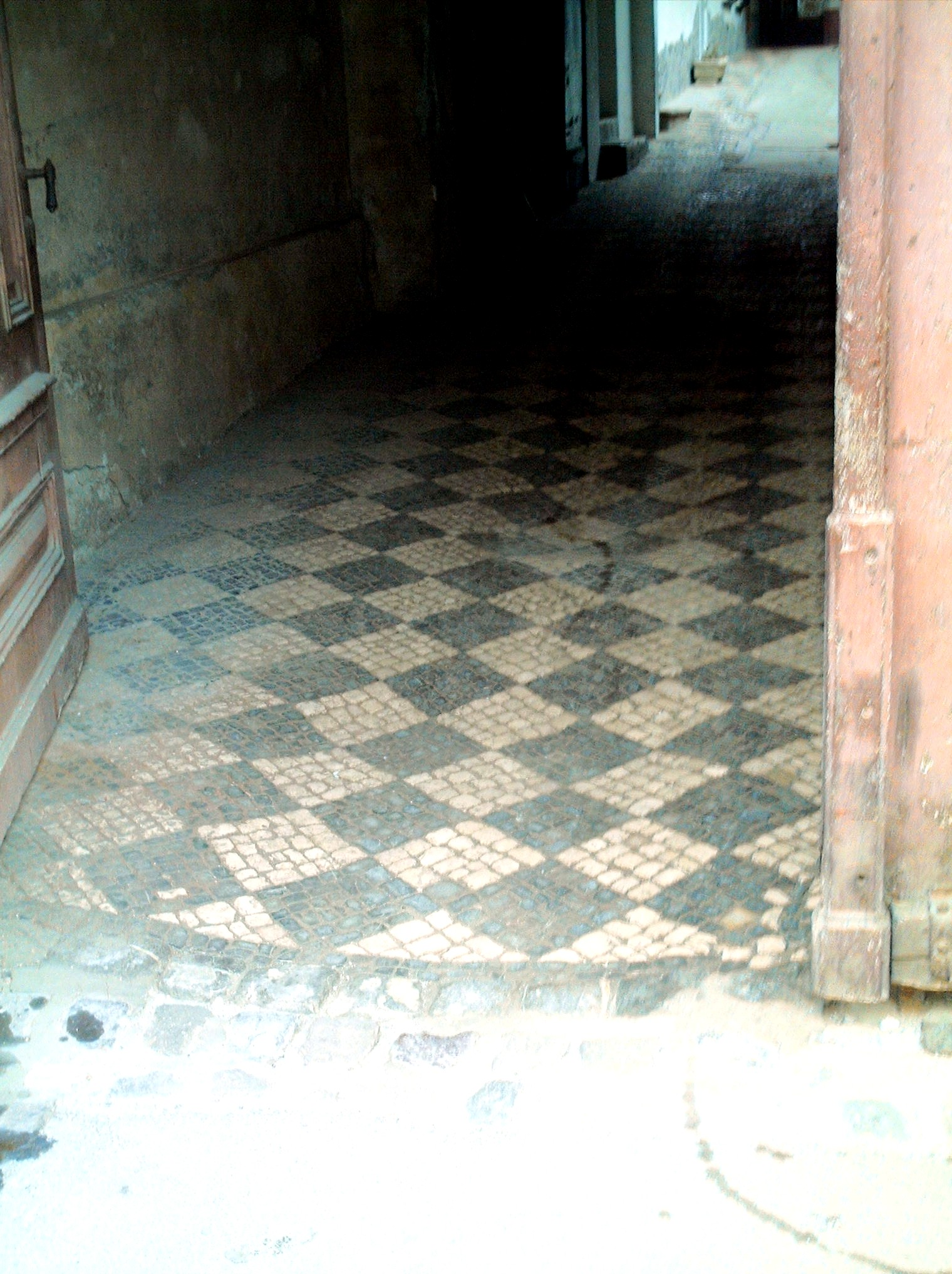 Ancienne rue pavée.